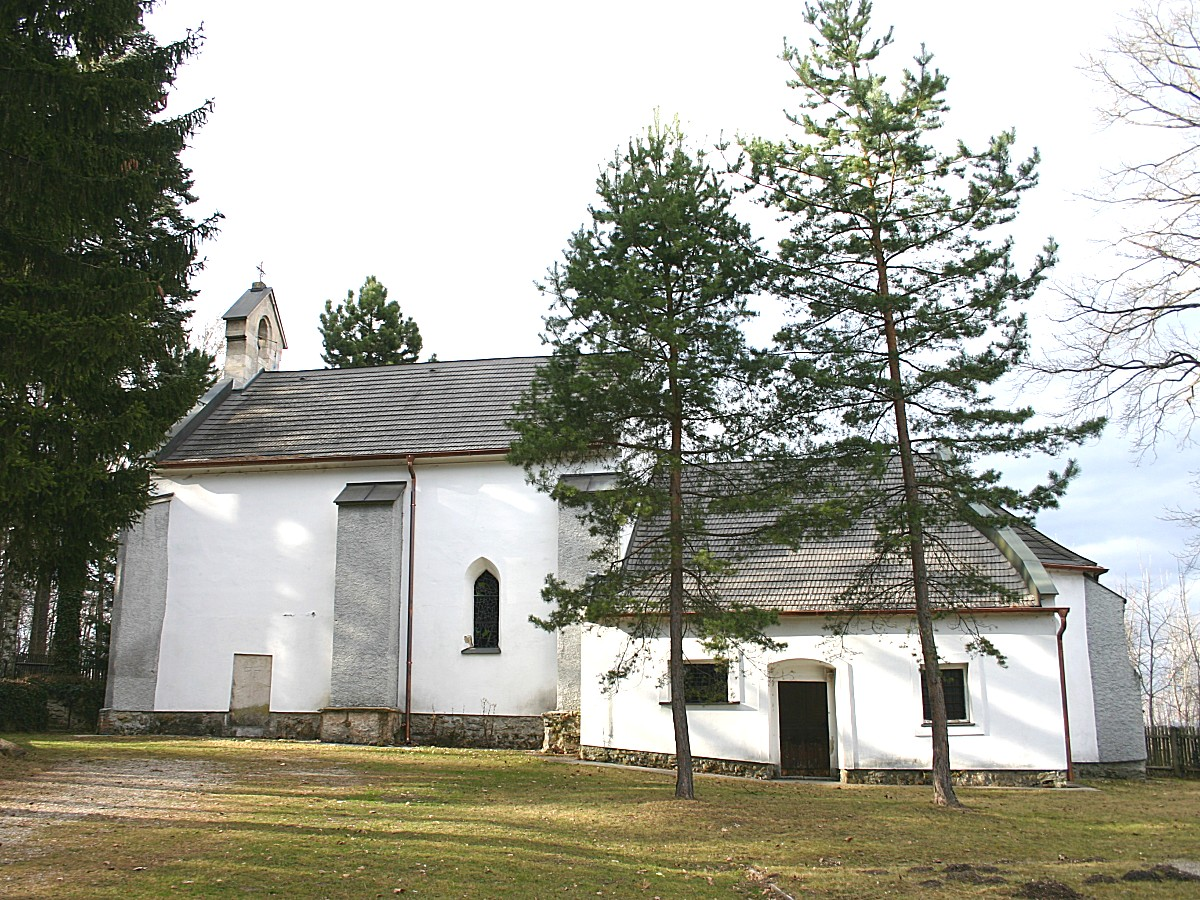 Erlach (Niederösterreich) Ulrichskirche